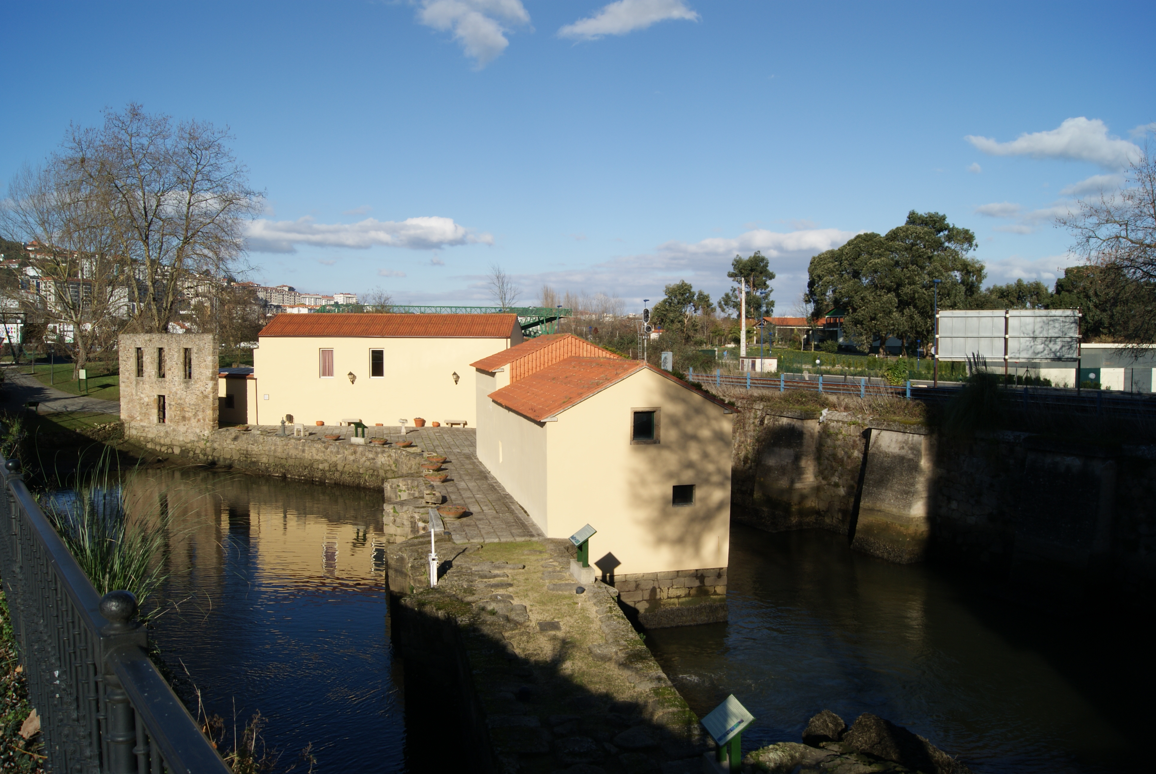 É un muíño de mareas restaurado, reconstruído e rehabilitado para amosar o funcionamento deste tipo de edificacións